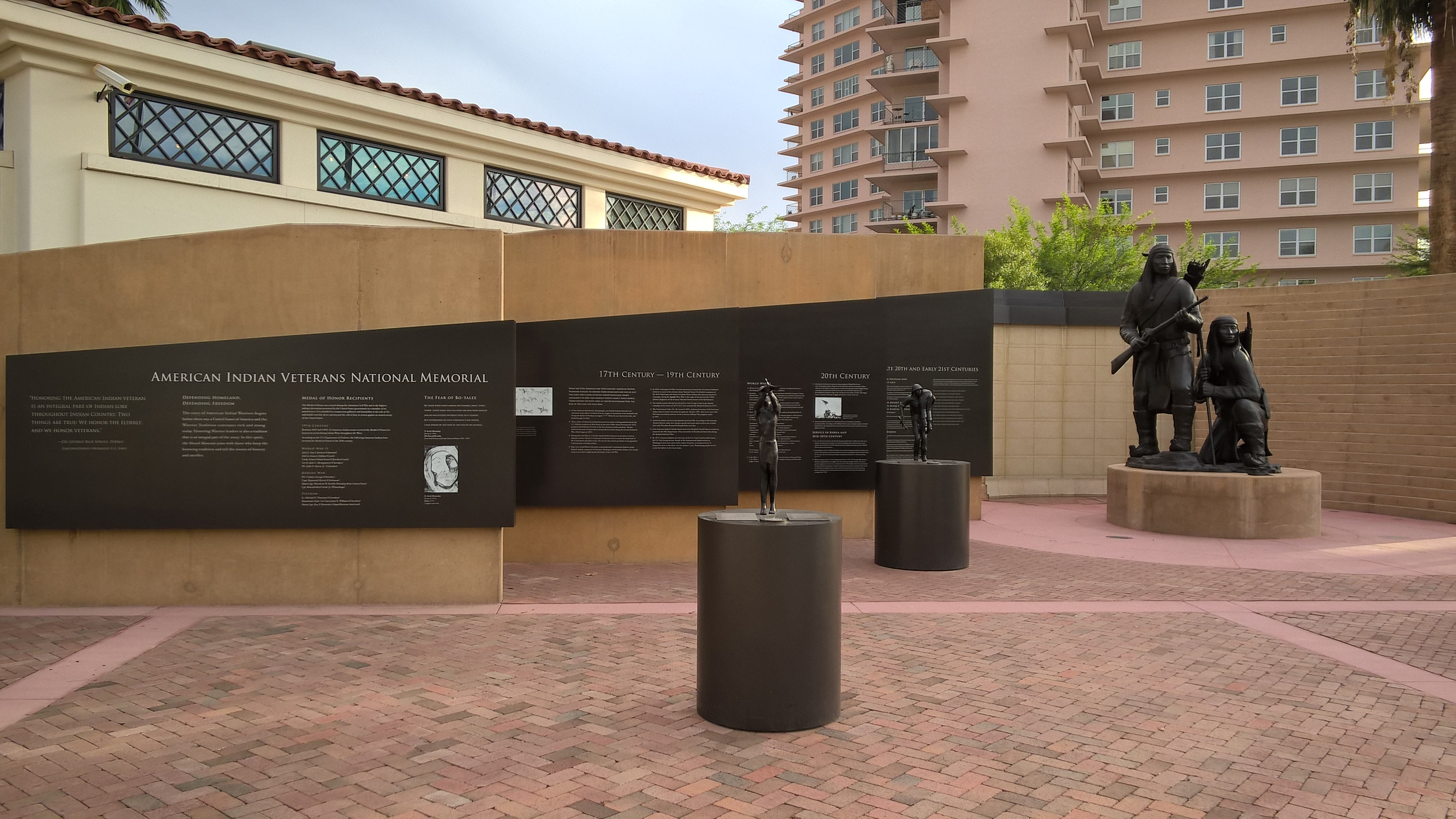 American Indian Veterans National Memorial